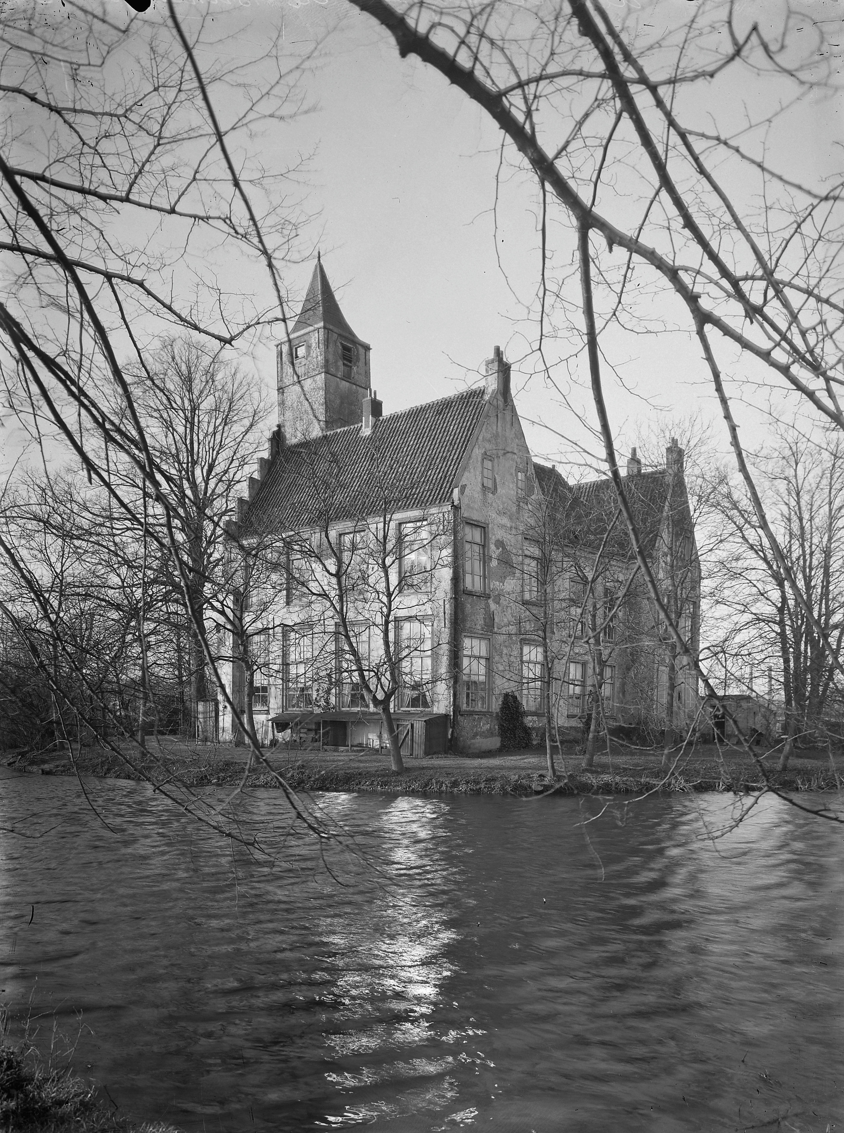 Huis de Binckhorst: Overzicht met water